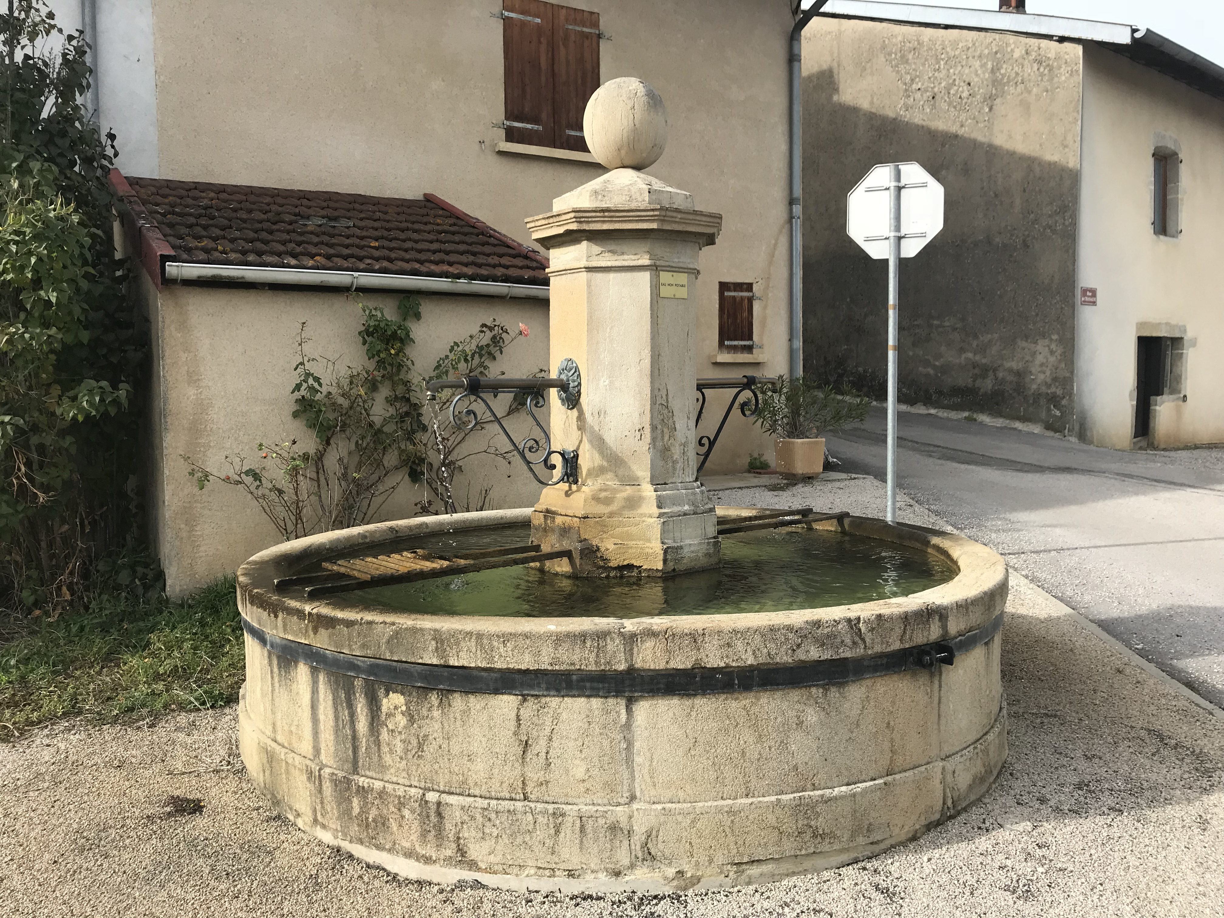 Vue du village de Véria (Jura, France) en octobre 2017.